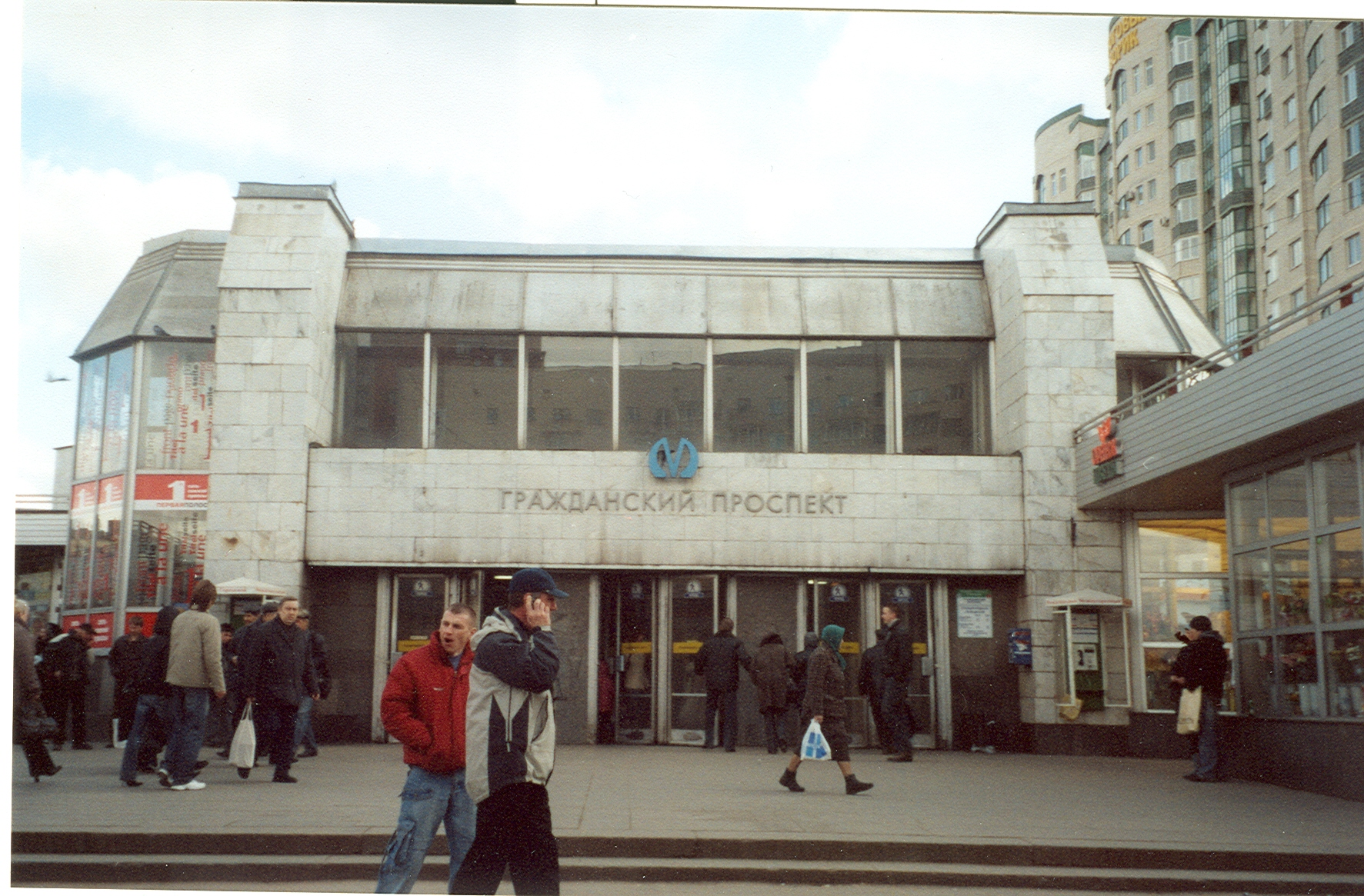 Вестибюль станции метро «Гражданский проспект»